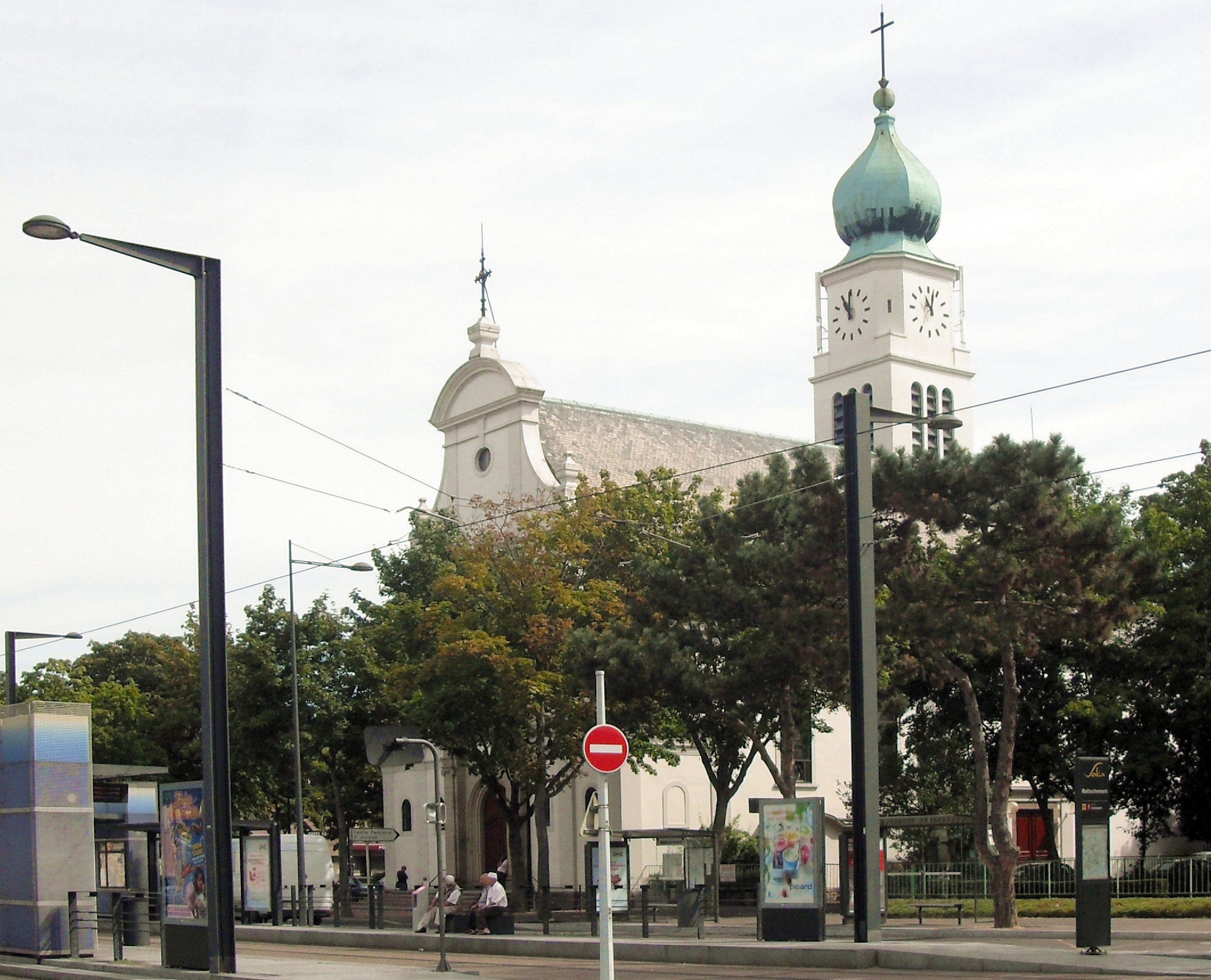 L'église Saint-Antoine de Bourtzwiller, commune de Mulhouse, côté sud-ouest